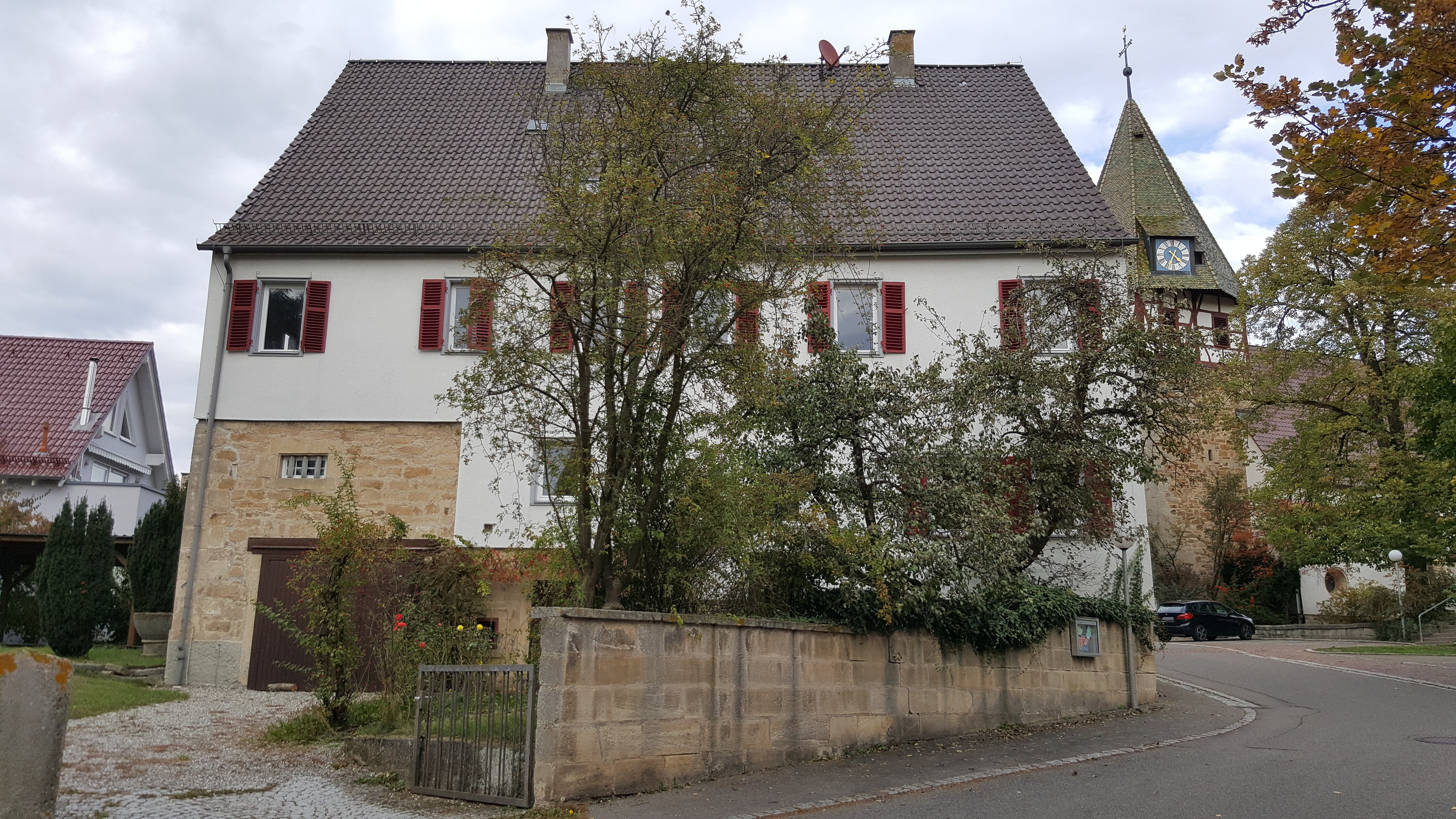 Walddorfhäslach Pfarrhaus Pfarrhof Gustav-Werner-Straße Walddorf